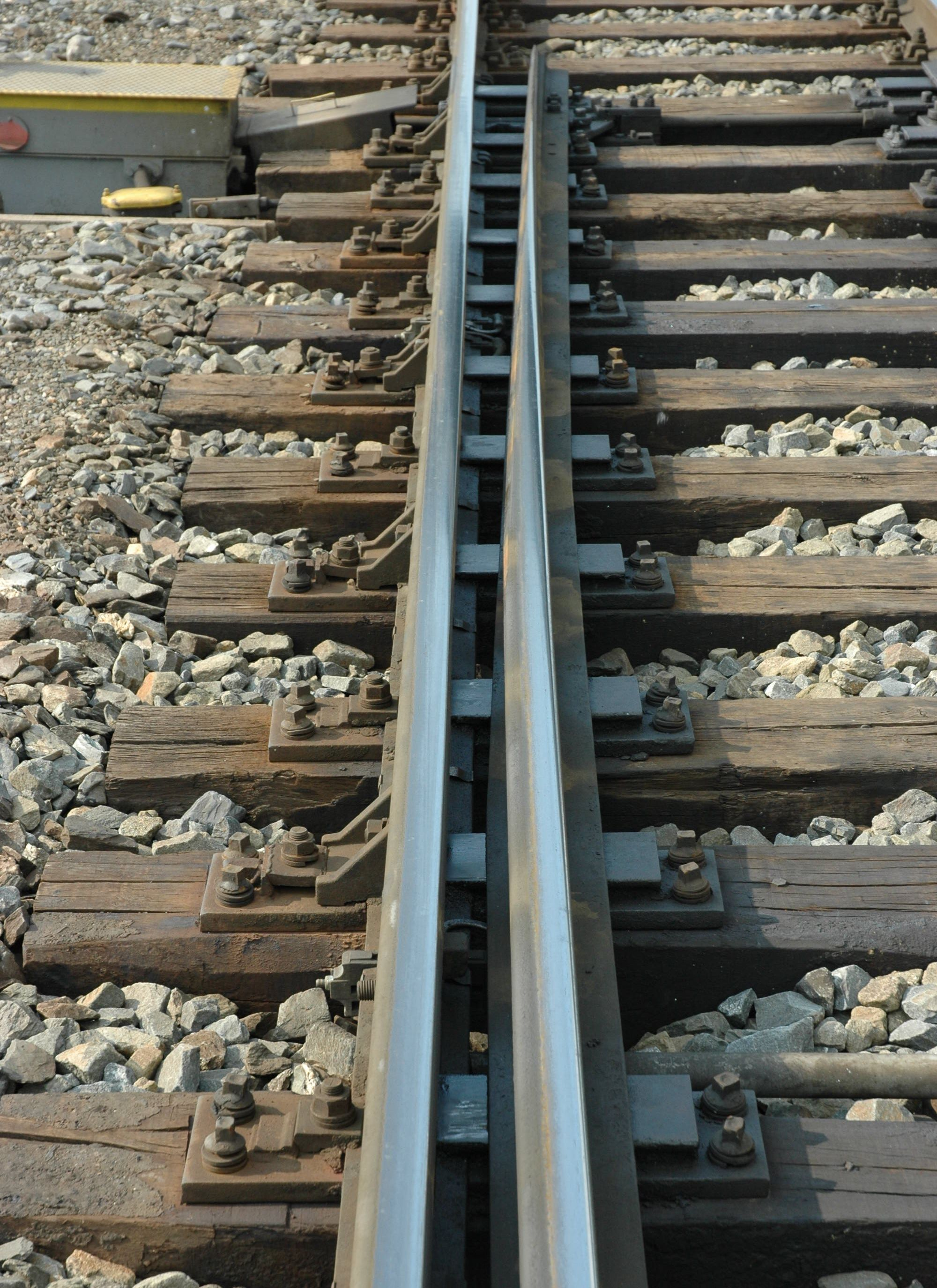 Česky: Opornice a jazyk výhybky. Ostrava báňské nádraží VOK - jižní zhlaví